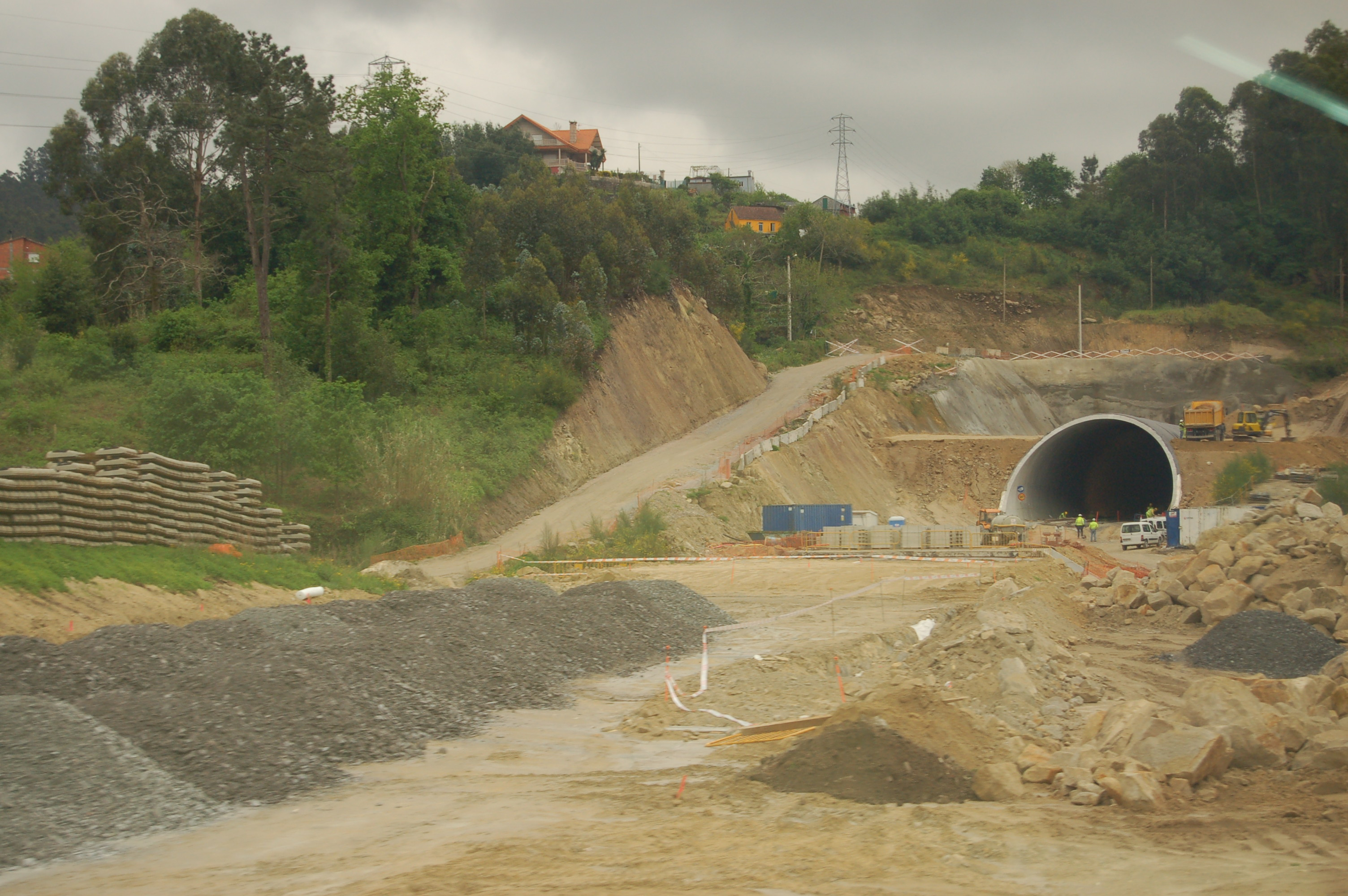 Obras de construción do eixe atlántico de alta velocidade; túnel entre Arcade e Redondela.